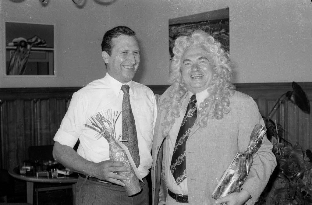 Bantzer (links) feiert seinen 54. Geburtstag. Es gratuliert sein Amtsvorgänger aus dem frühen 18. Jahrhundert, "Altbürgermeister" Asmus Bremer, gespielt von Siegfried Lorisch (rechts). Asmus Bremer hatte einen Tag vor dem Oberbürgermeister Geburtstag.